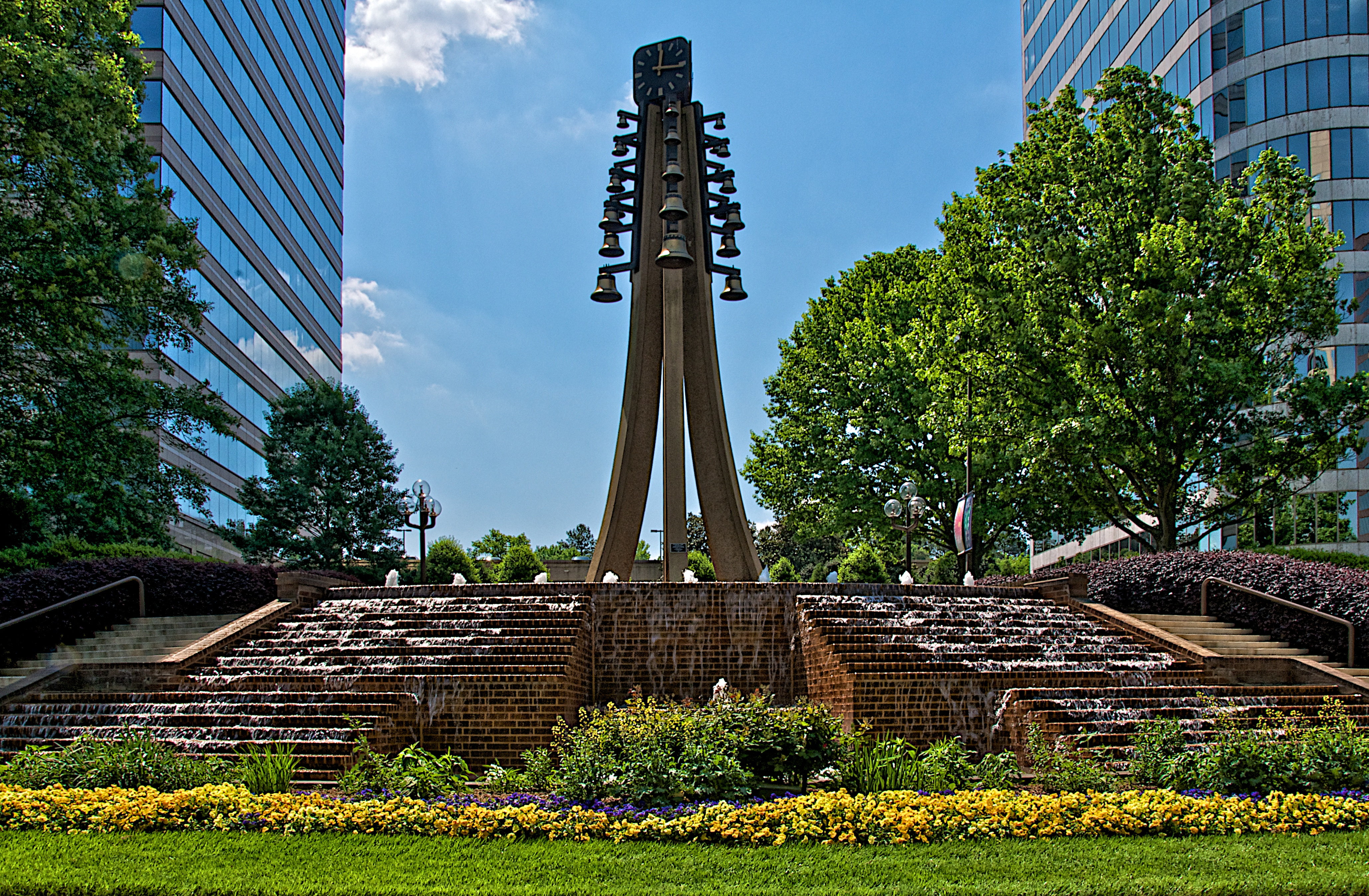 Galleria Gardens, Atlanta